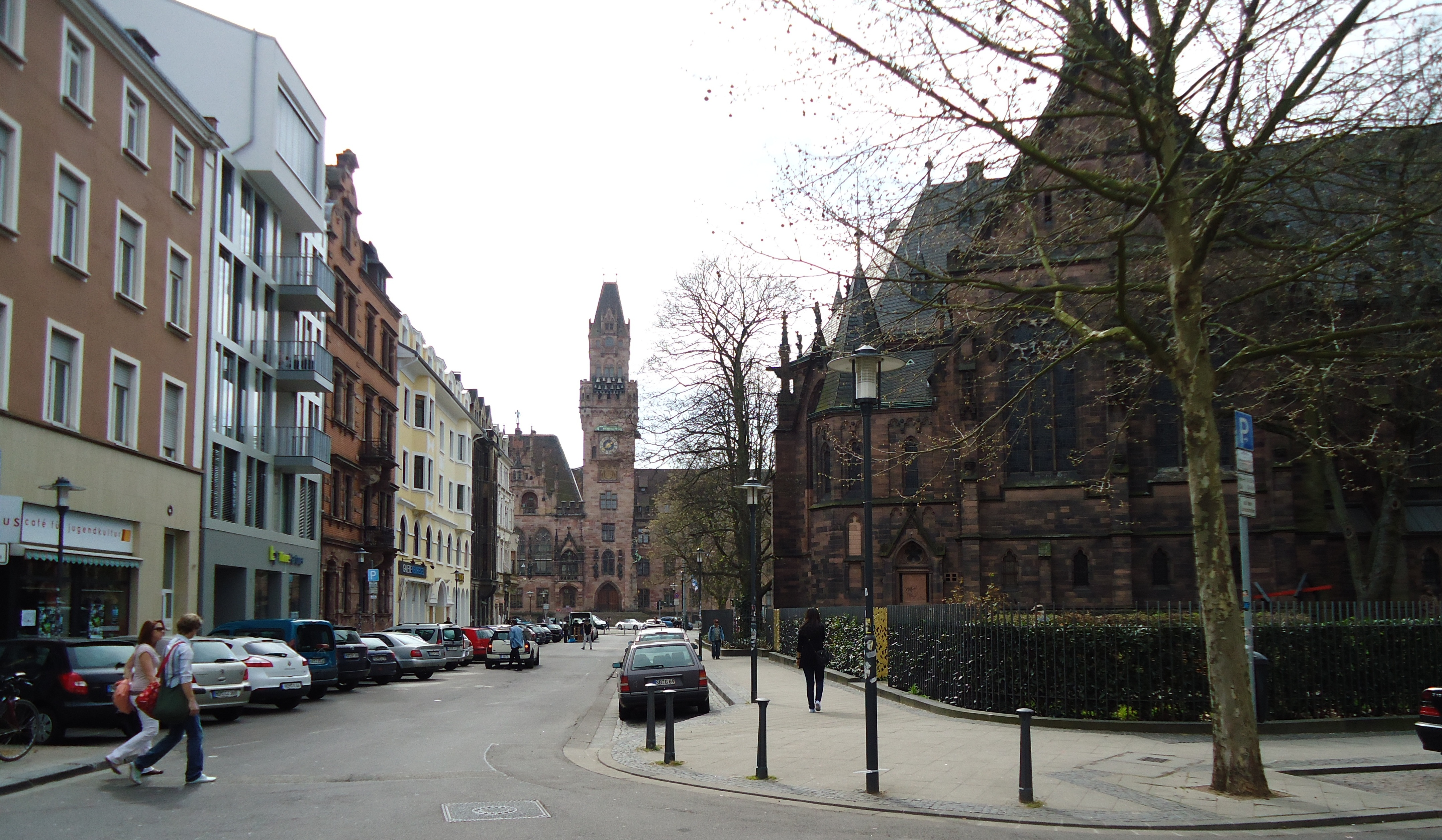 Blick auf das Rathaus in Saarbrücken